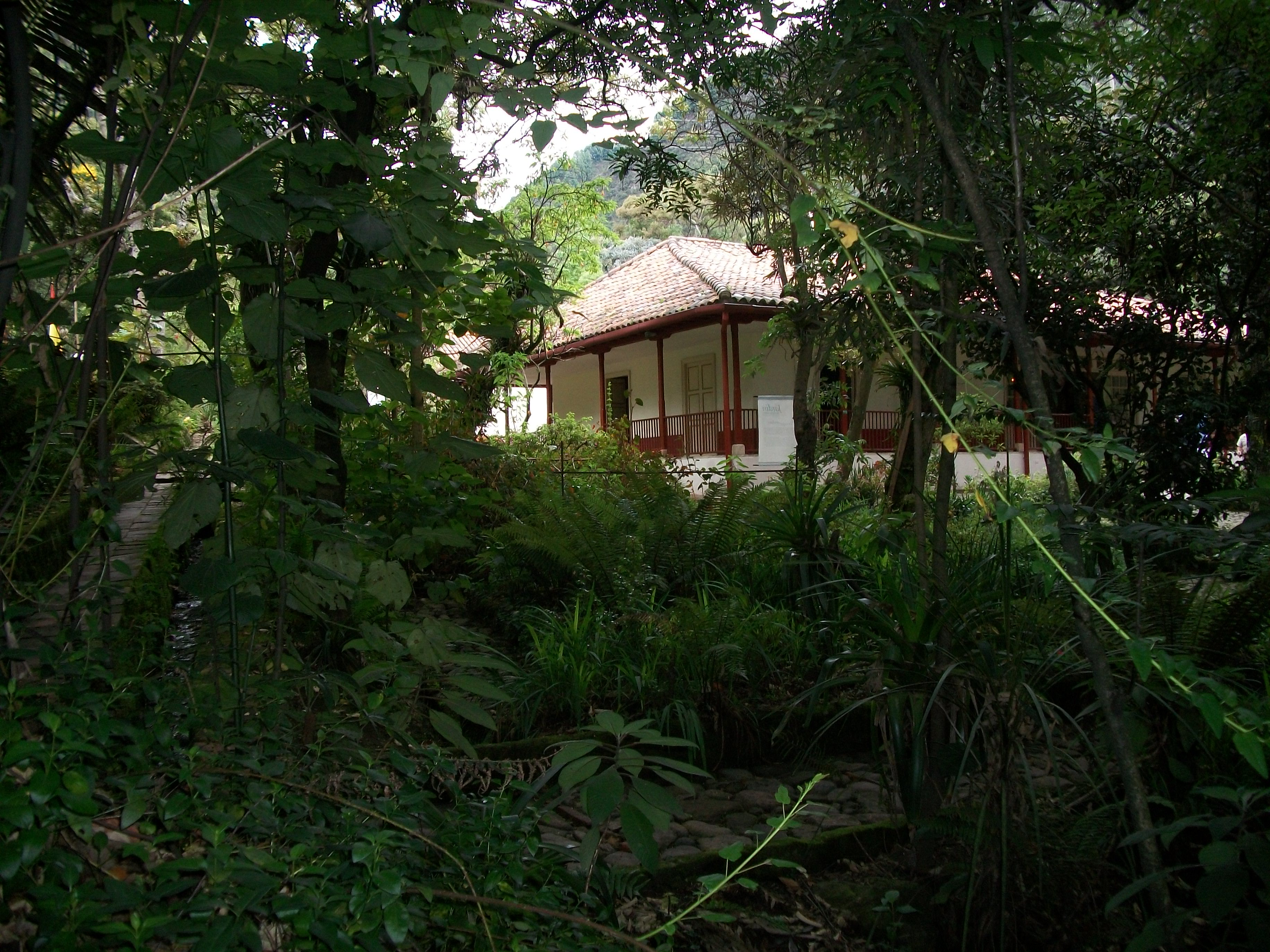 Casa de la Quinta de Bolívar desde la parte baja del jardín, hacia la entraada.